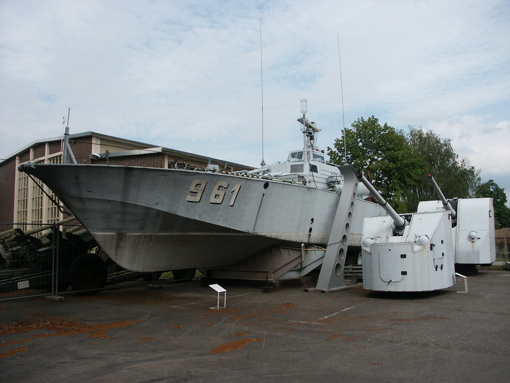 Bundeswehrmuseum Dresden mit Teilen von der NVA Small torpedo booat Nr. 961 (factory number 131.422) of Project 131 (Libelle) class of the GDR Navy